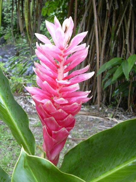 Alpinia purpurata